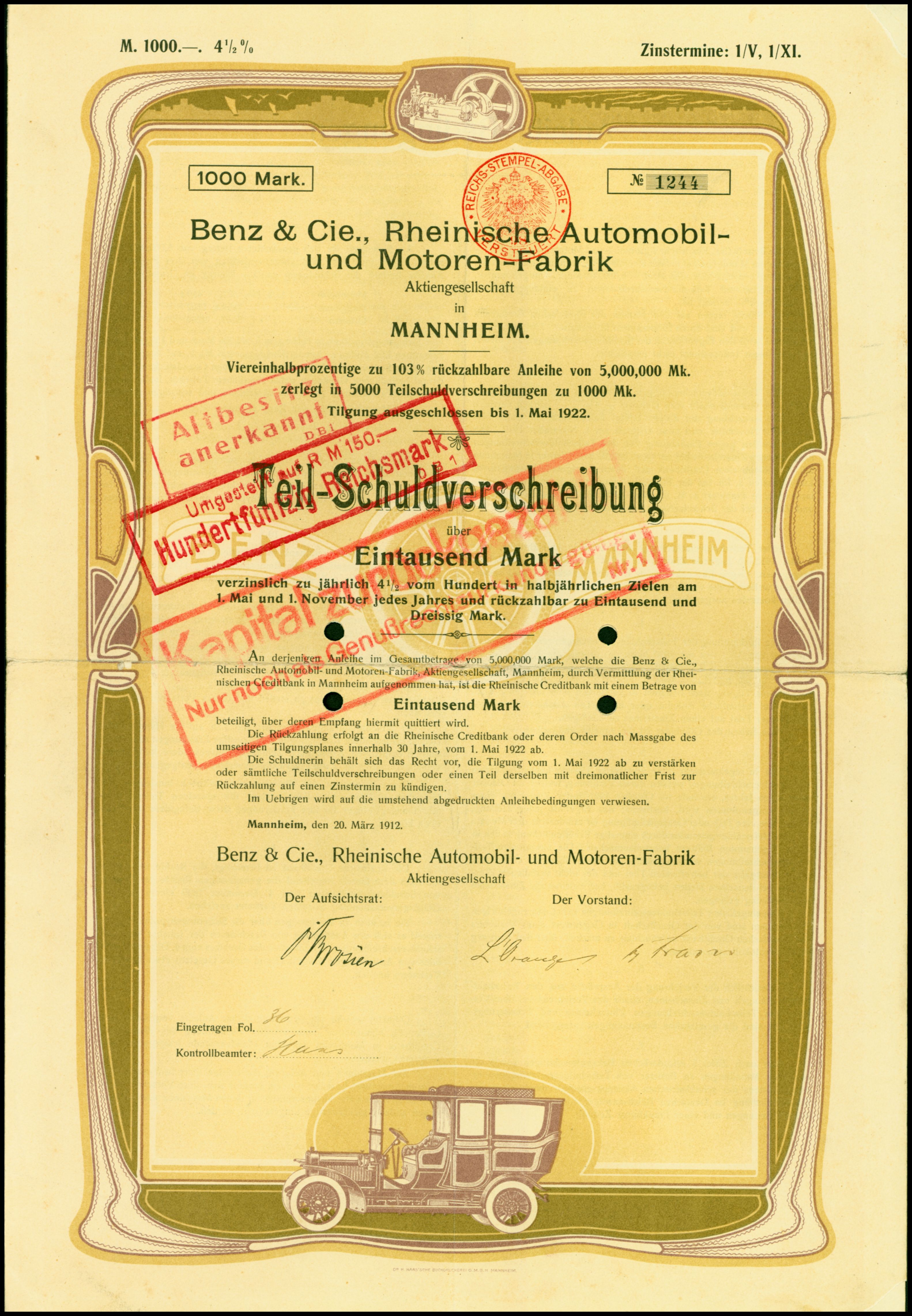 Teil-Schuldverschreibung über 1000 Mark der Benz & Cie., Rheinische Automobil- und Motoren-Fabrik vom 20. März 1912; aus dem Fundus des Ersten Deutschen Historic-Actien-Museum e.V. (EDHAM), Kürnbach